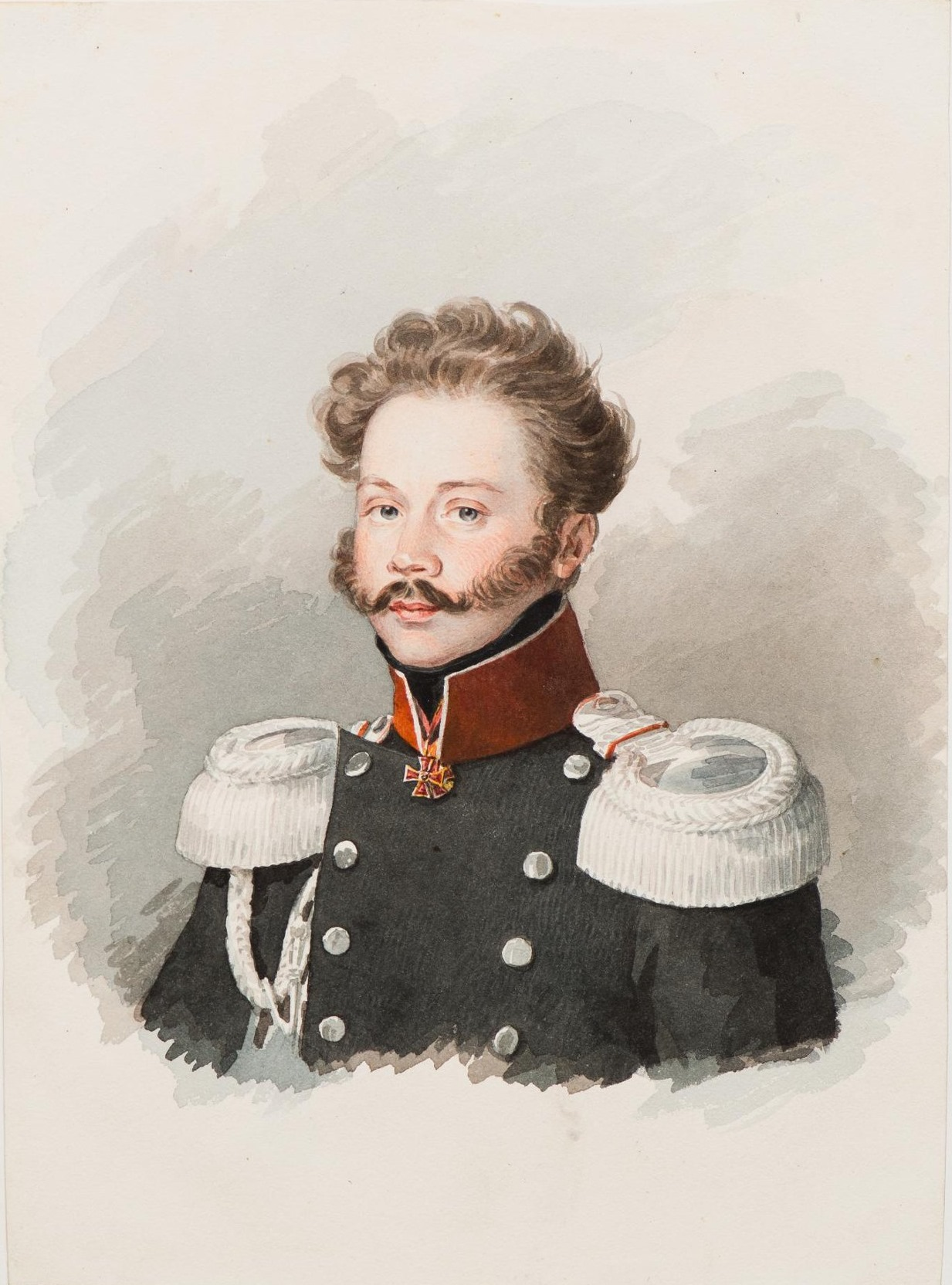 Иван Дмитриевич Чертков (1796—1865) — основатель первого в России детского приюта (1837).